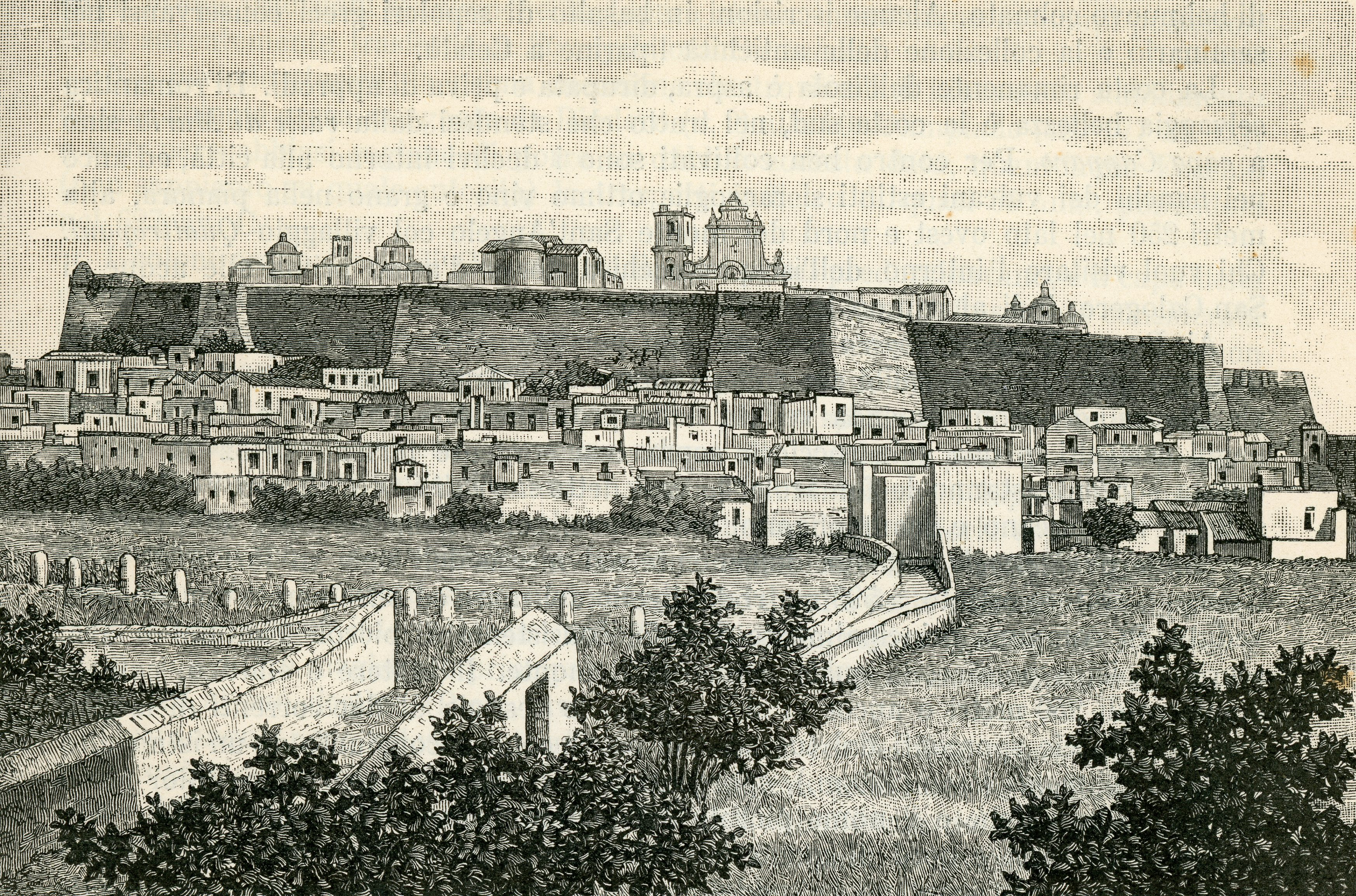 Castello di Lipari (incisore anonimo 1892).